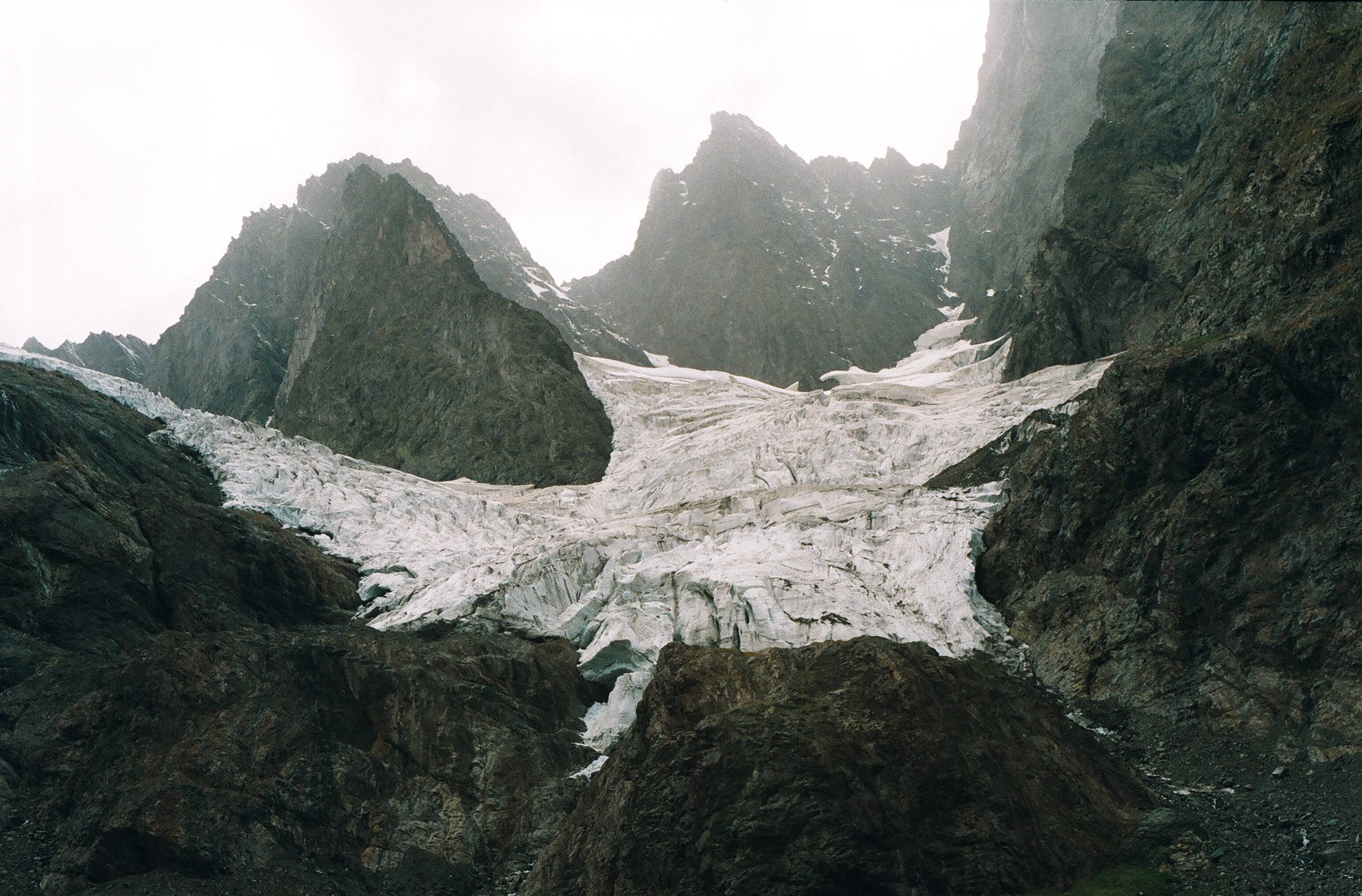 Ледник "Звезда". Ущелье перед Клухорским перевалом. Тебердинский заповедник.